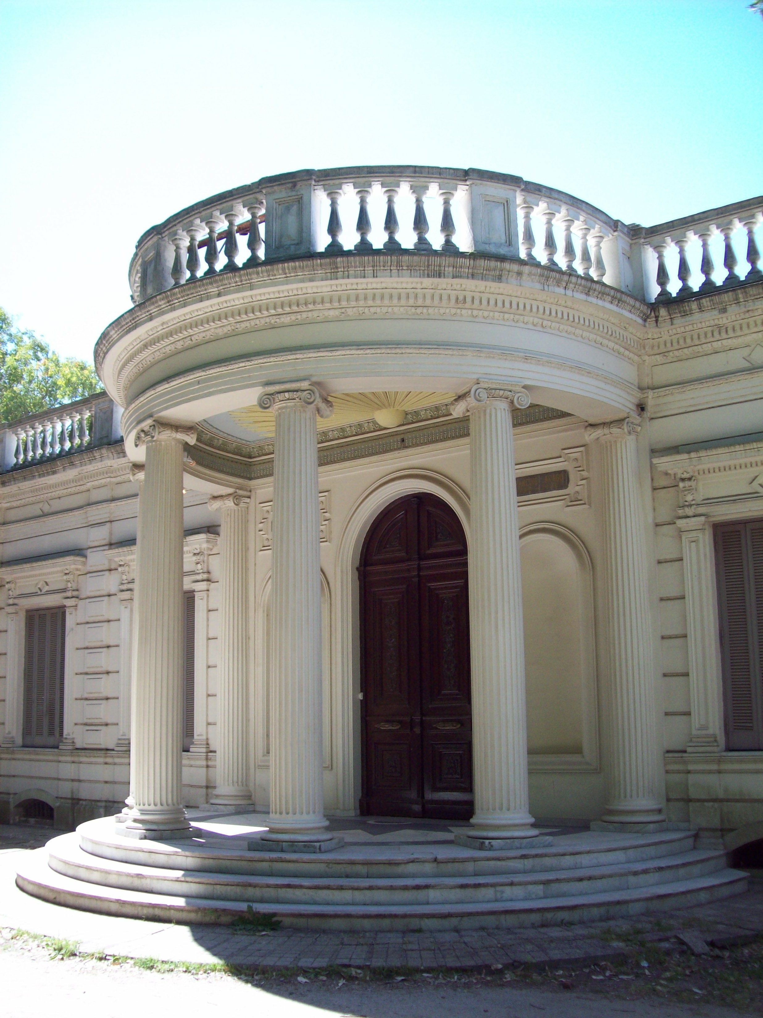 Entrada de un edificio de la Facultad de ciencias astronómicas y geofísicas (UNLP).